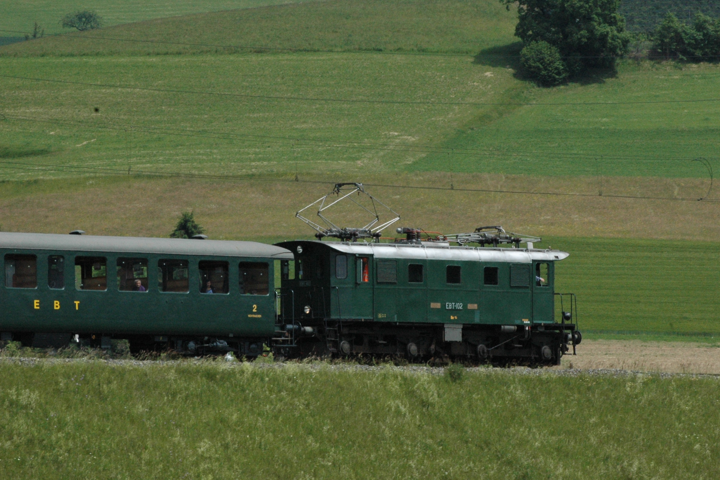 Historische Lokomotive EBT Be 4/4 Nr. 102 anlässlich des Jbiläums "150 Jahre Eisenbahn in Konolfingen" unterwegs zwischen Grosshöchstetten und Konolfingen